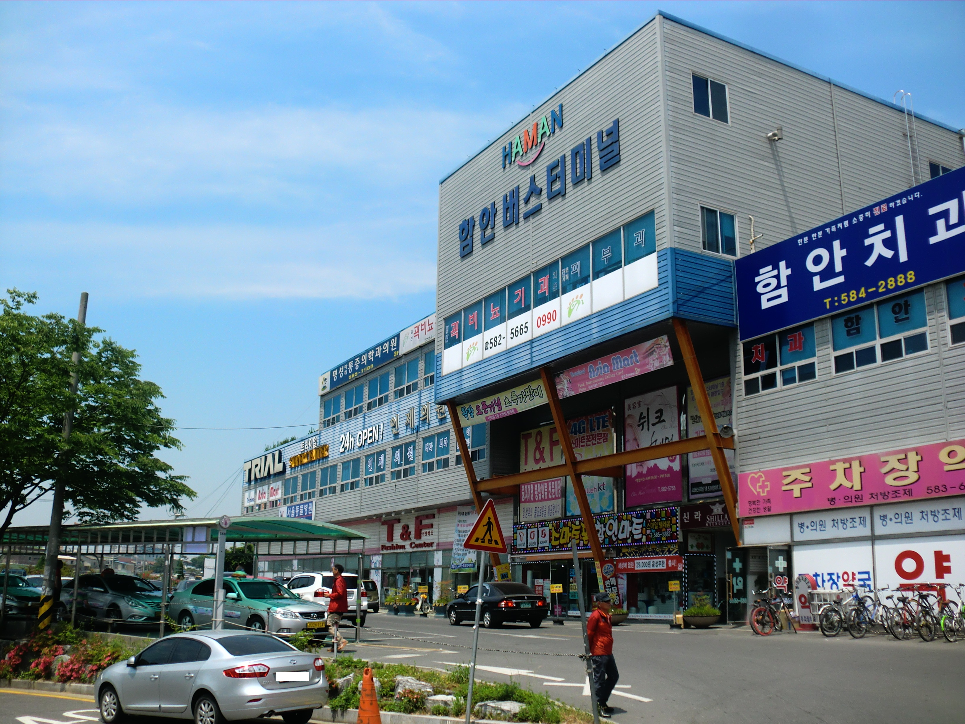 경상남도 함안군에 있는 함안버스터미널